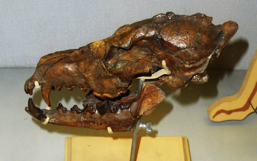 Fossil of Canis arnensis, an extinct mammal - Took the picture at Museo di Paleontologia di Firenze